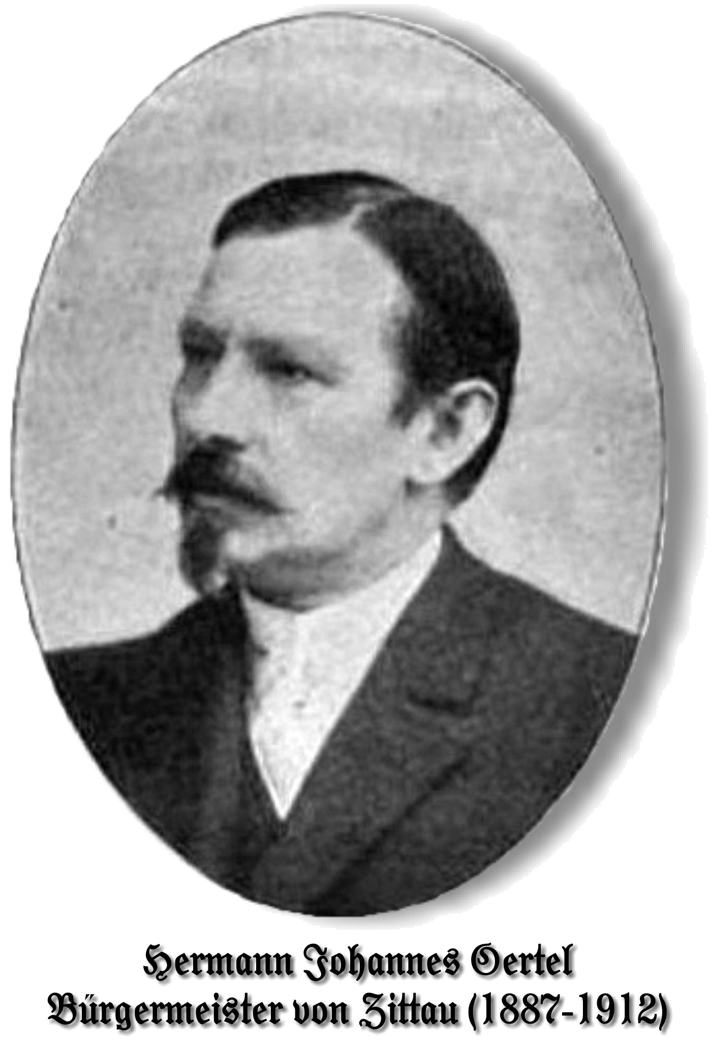 Schutzfrist abgelaufen, gemeinfrei